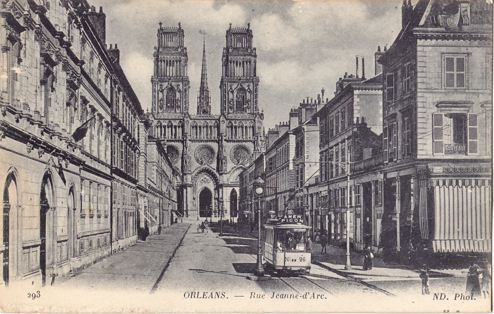 Carte postale ancienne éditée par ND, n°293 : ORLEANS - Rue Jeanne-d'Arc